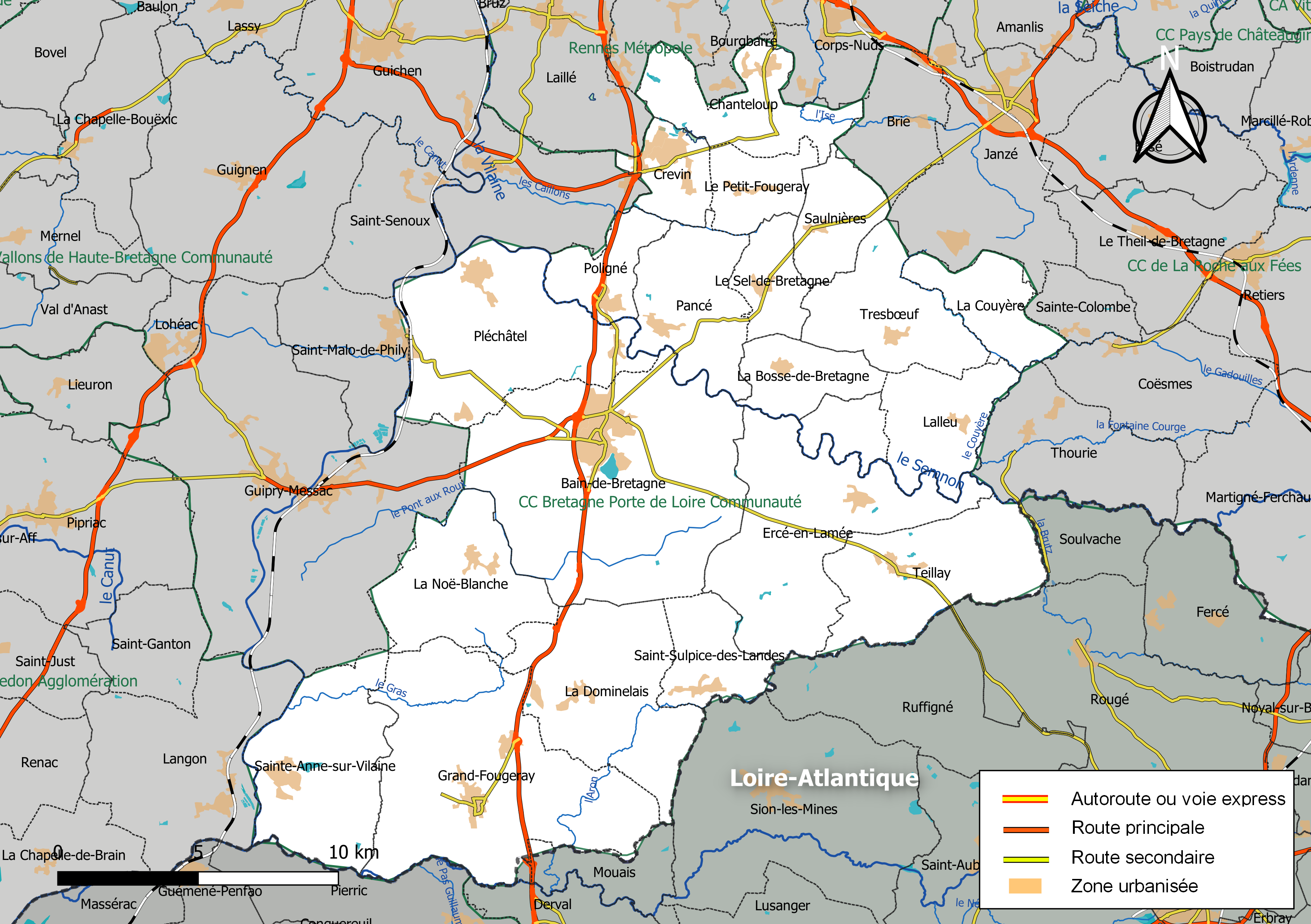 Carte géographique de l'intercommunalité Bretagne porte de Loire Communauté, département d'Ille-et-Vilaine, France. Composition au 1er janvier 2019.